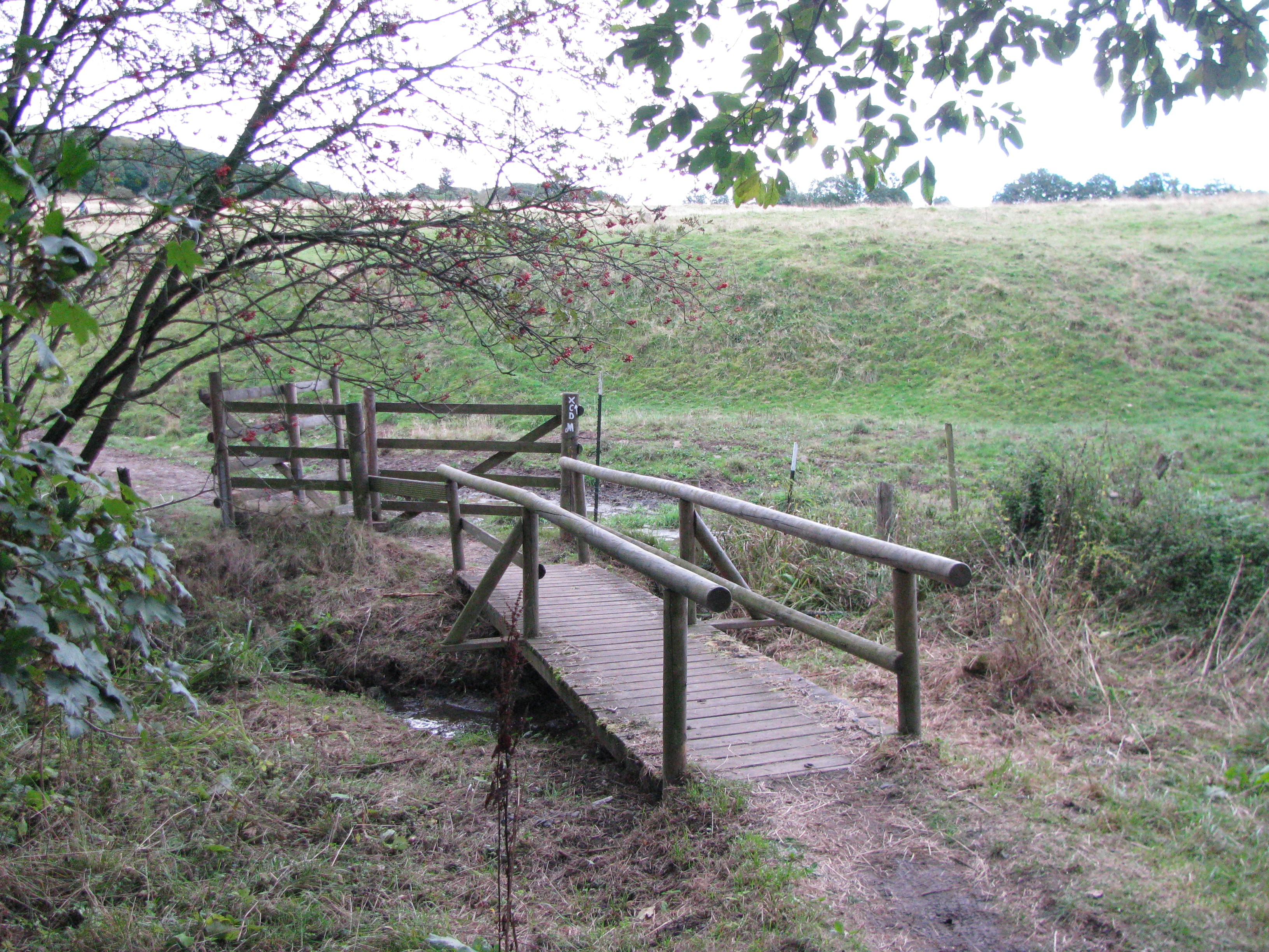 Holzbrücke über die Ahne unterhalb des Vorwerks Sichelbach